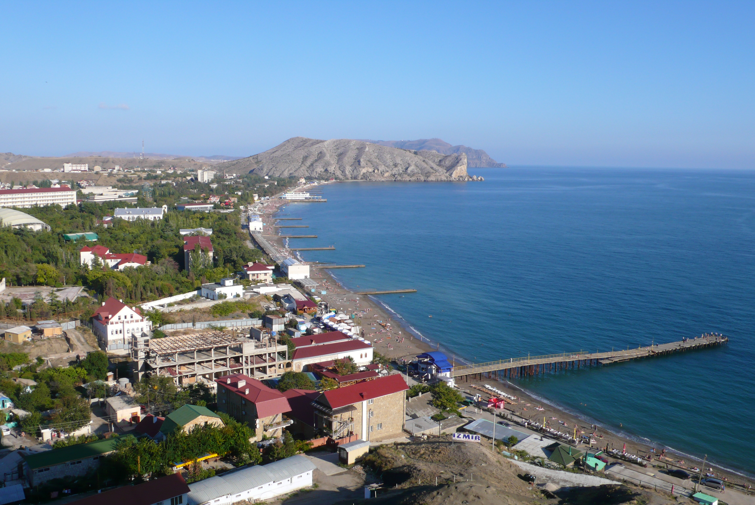 Судак. Вид из Генуэзской крепости